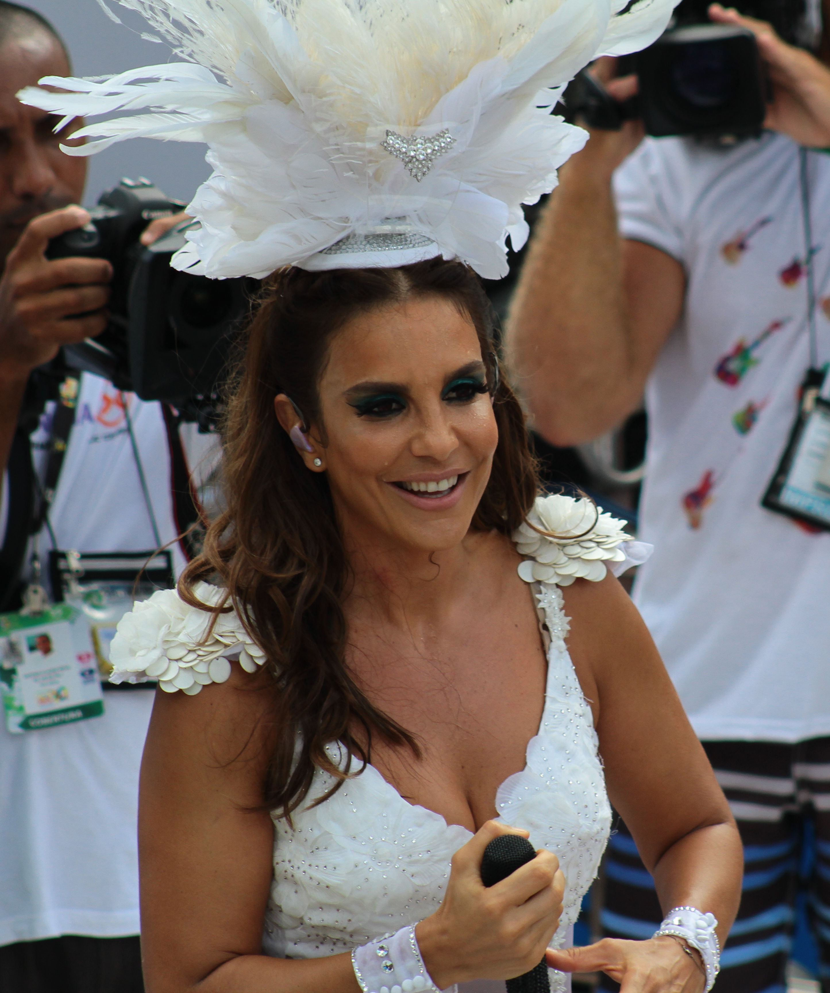 Ivete Sangalo e o Bloco Coruja. Terça (12.02) na Avenida.